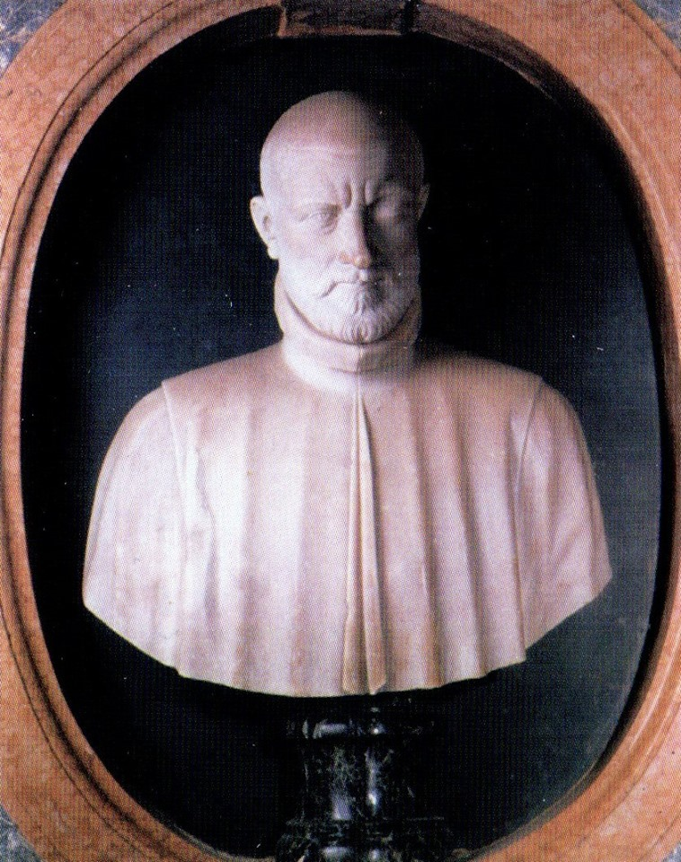 Busto marmoreo di Tullo Petrozzani